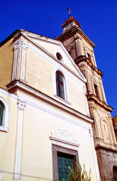 Chiesa Santa Marie delle Grazie di Brusciano. Foto dall'archivio dell'utente Lavico.